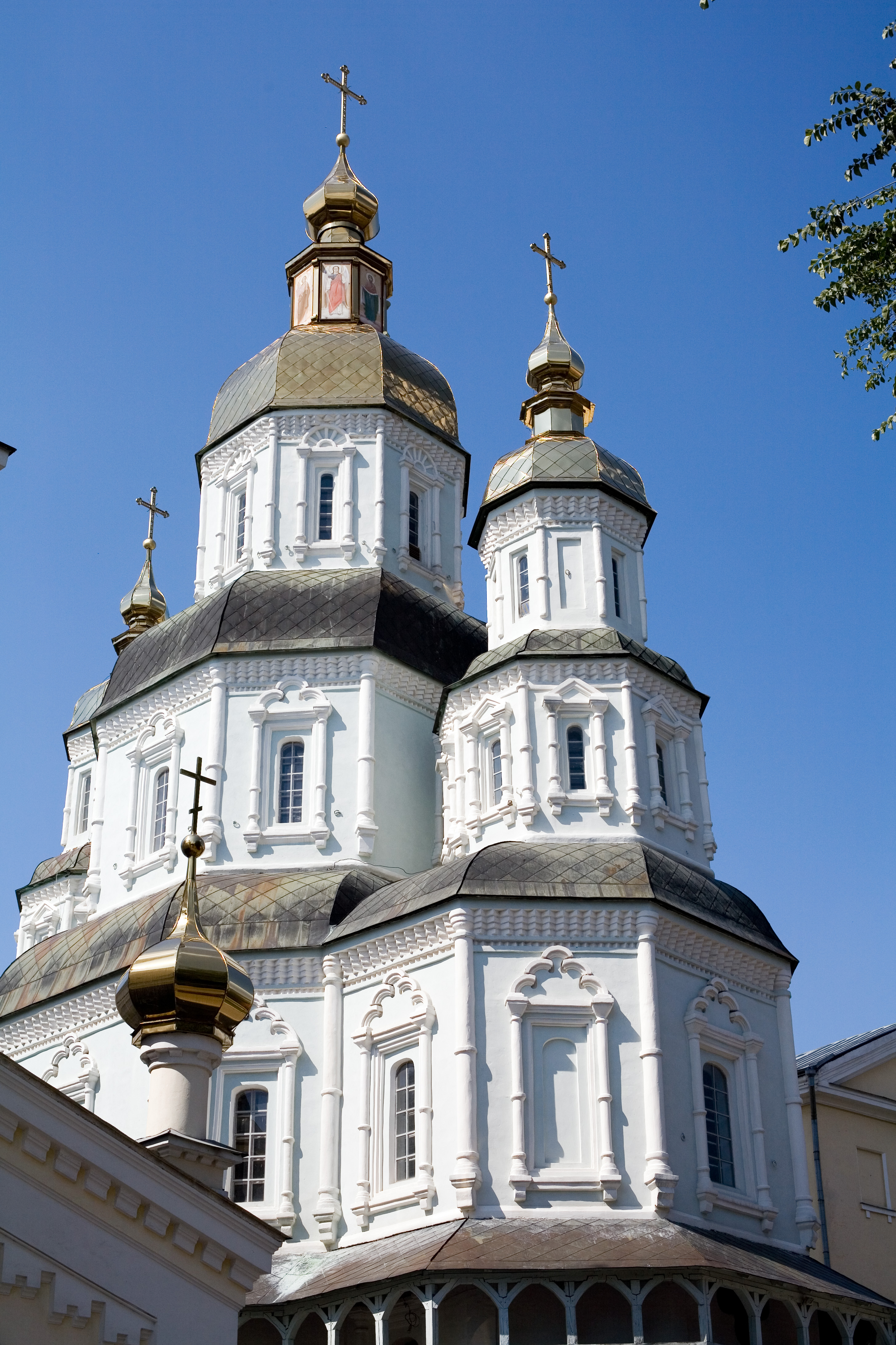 Pokrovsky Monastery in Kharkov